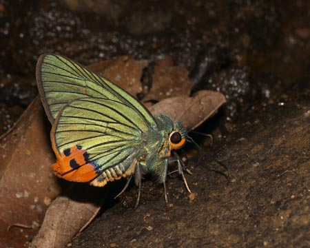 Indian Awlking Choaspes benjaminii